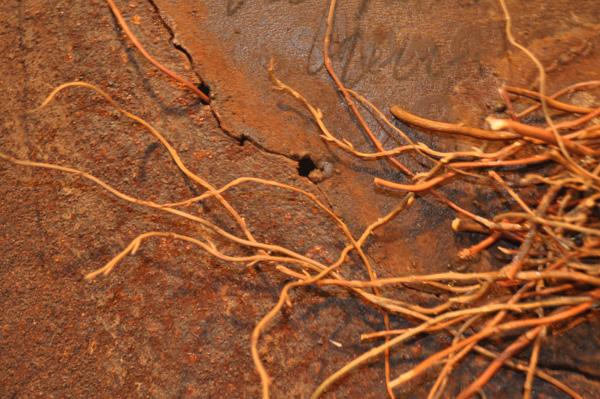 Alguns dels materials amb què treballa Beth Fornas